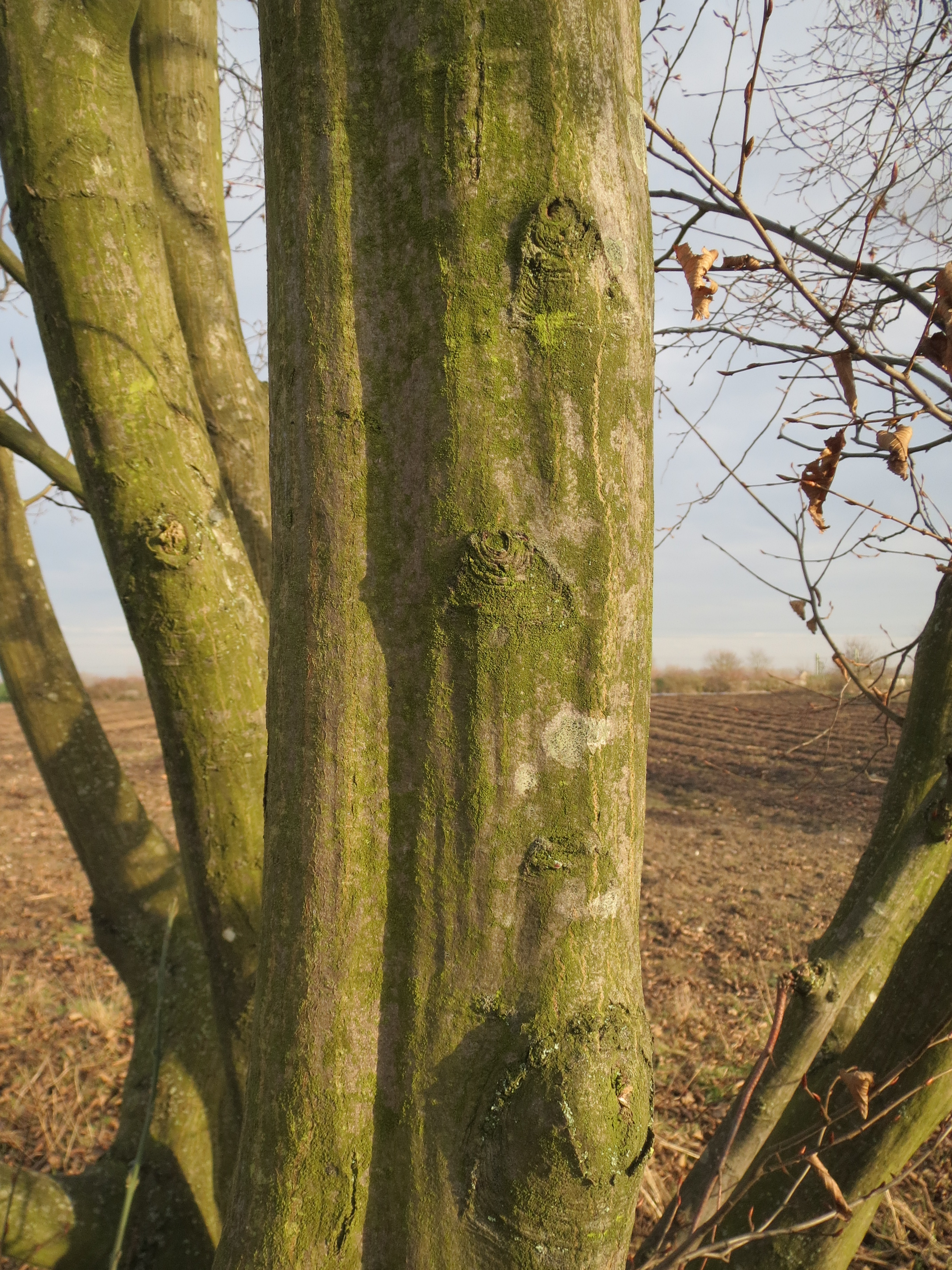 Hainbuche (Carpinus betulus) bei Neulußheim